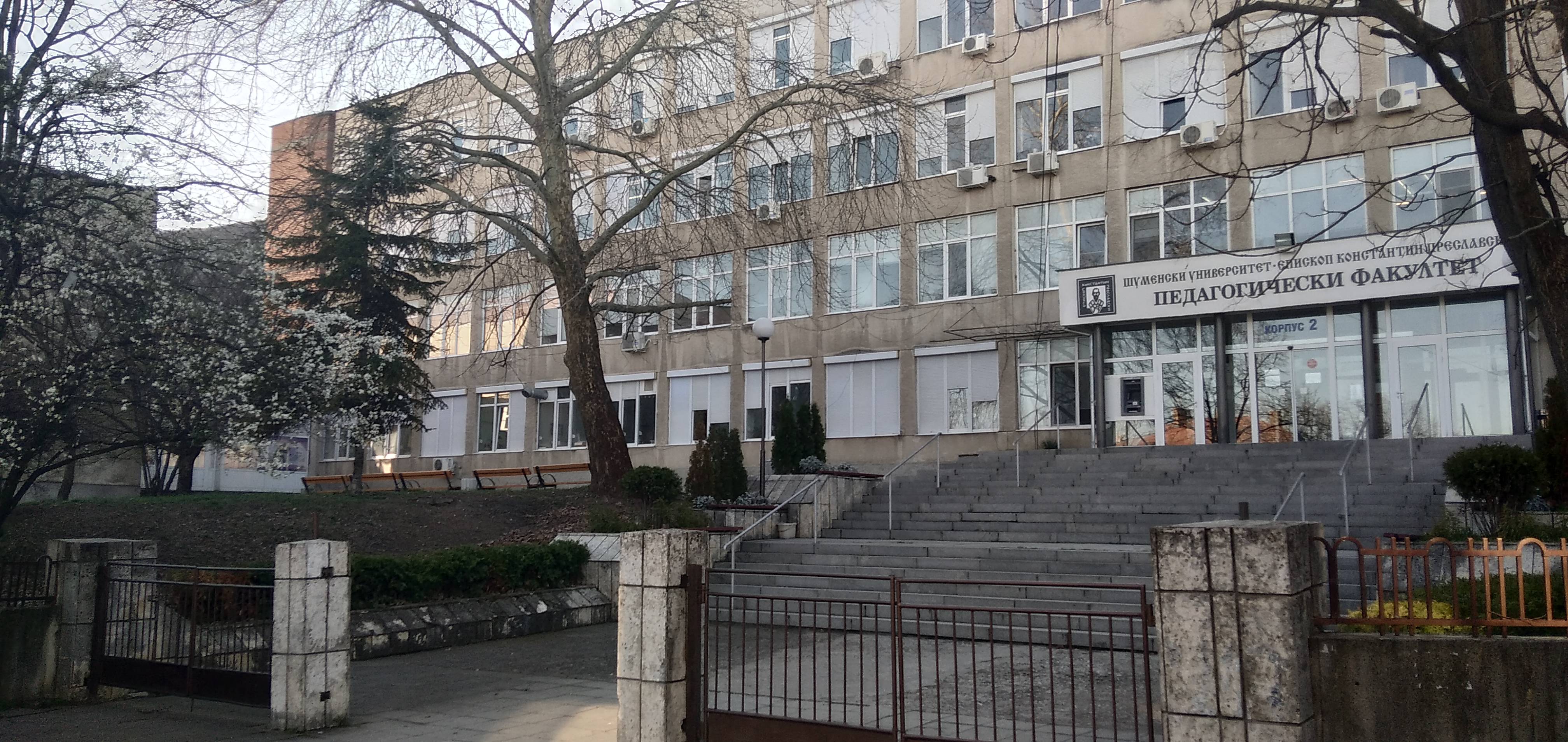 Входа на 2-ри корпус на Шуменския университет, където се помещава Педагогическият факултет.